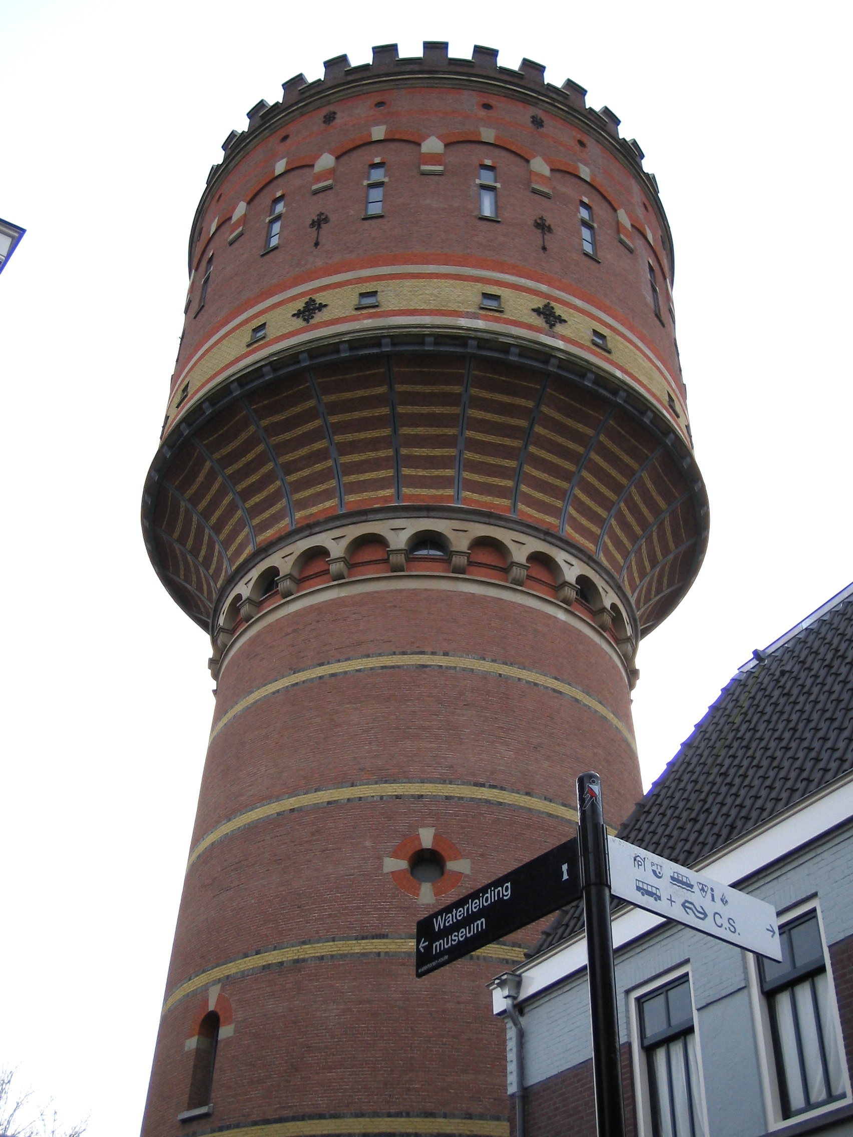 Watertoren Lauwerhof, Waterleidingmuseum Utrecht